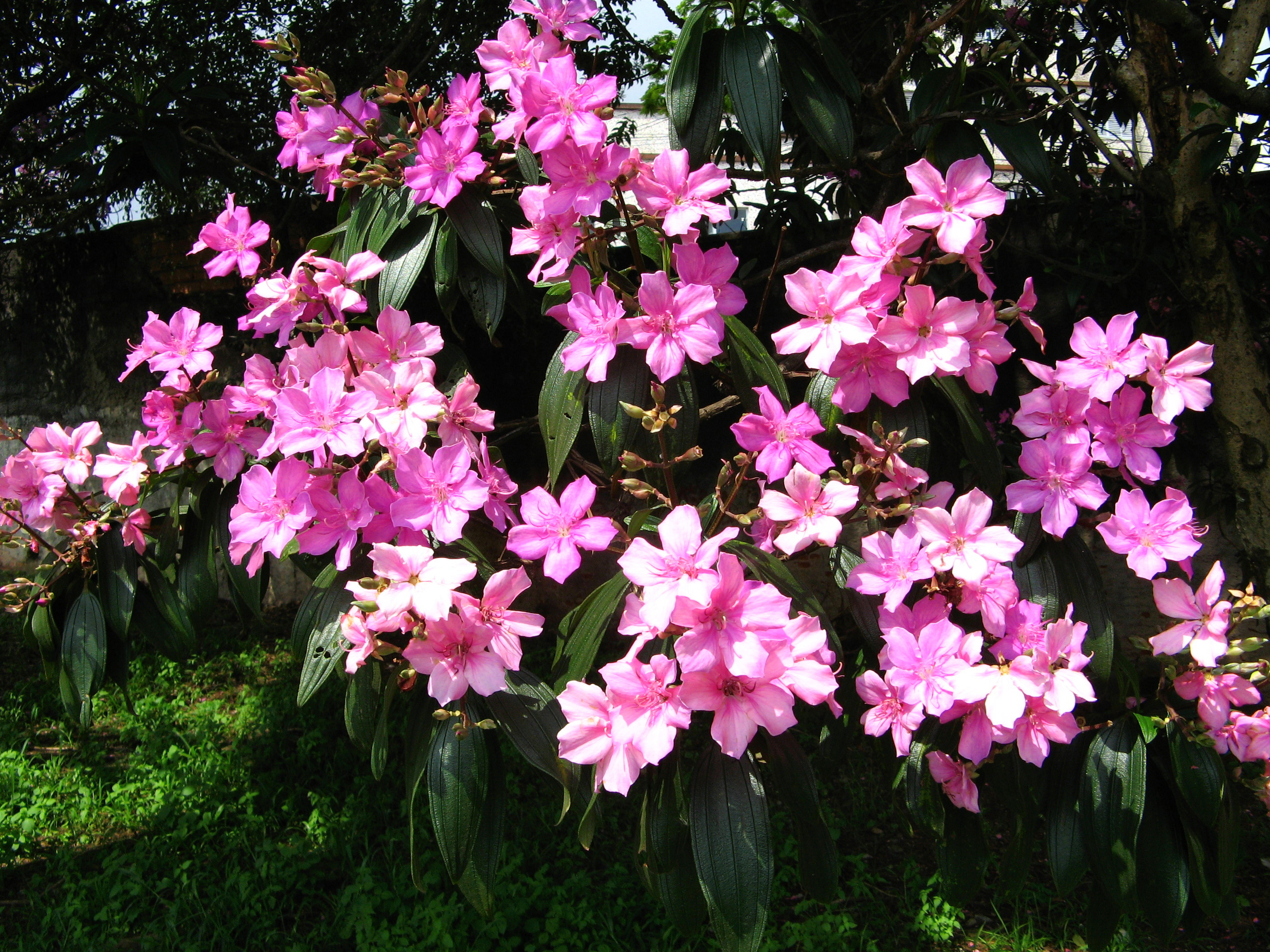 quresmeiras flowers Ceret park sao paulo